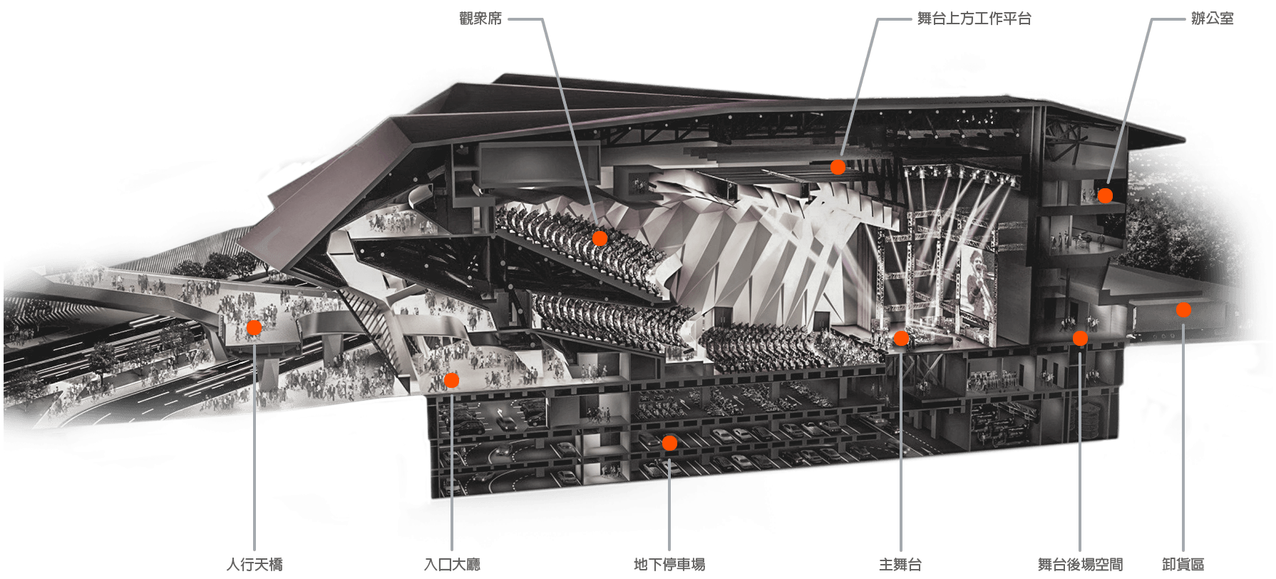 中文（台灣）: TMC表演廳 建築透視圖 「宇宙能量／匯集於此」 表演廳是為流行音樂展演設計之專屬場館，為一地上五層、地下三層的建築，外觀為不規則的殼狀造型，常被暱稱為「太空船」，鋼造結構外包覆灰綠色烤漆屋頂，乃建築師模擬臺灣山岳重巒疊嶂特色，象徵臺灣流行音樂邁入新世紀後，屢創高峰的多元發展之勢。室內依活動配置規劃，最多可容納約5,000人。場館另包含化妝室、休息室、排練室、行政辦公室以及服務設施區域等。 表演廳屋頂外牆為金屬屋面系統，由隔音/隔熱層、鋁板和方鋼管等相關構件構成，表層金屬板高度防水，並具有隔音隔熱功能。大廳入口樑柱外牆使用鋼板包覆系統，以無縫式設計表現整體感。 Attribution: 臺北流行音樂中心